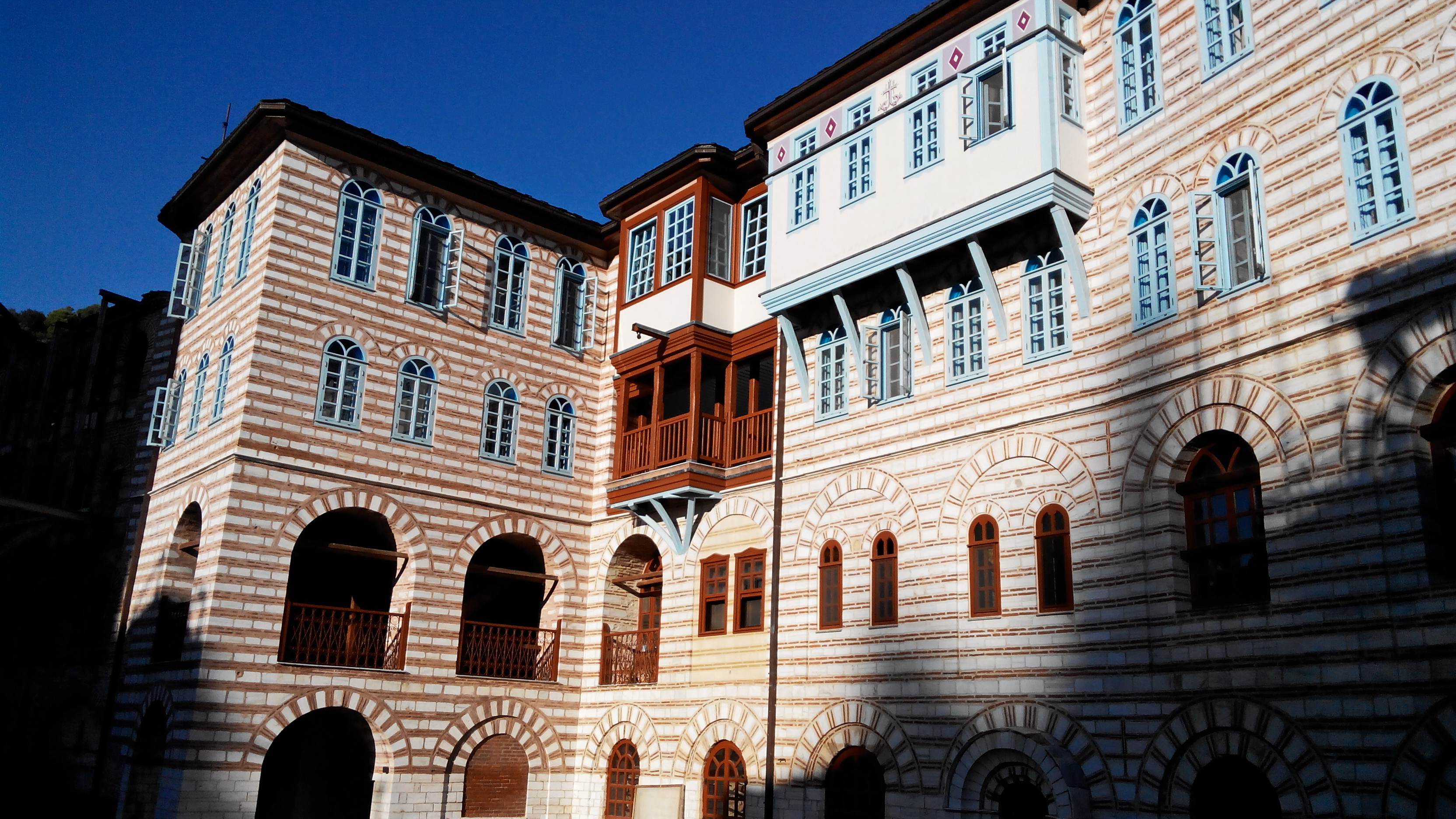 Манастир Хиландар